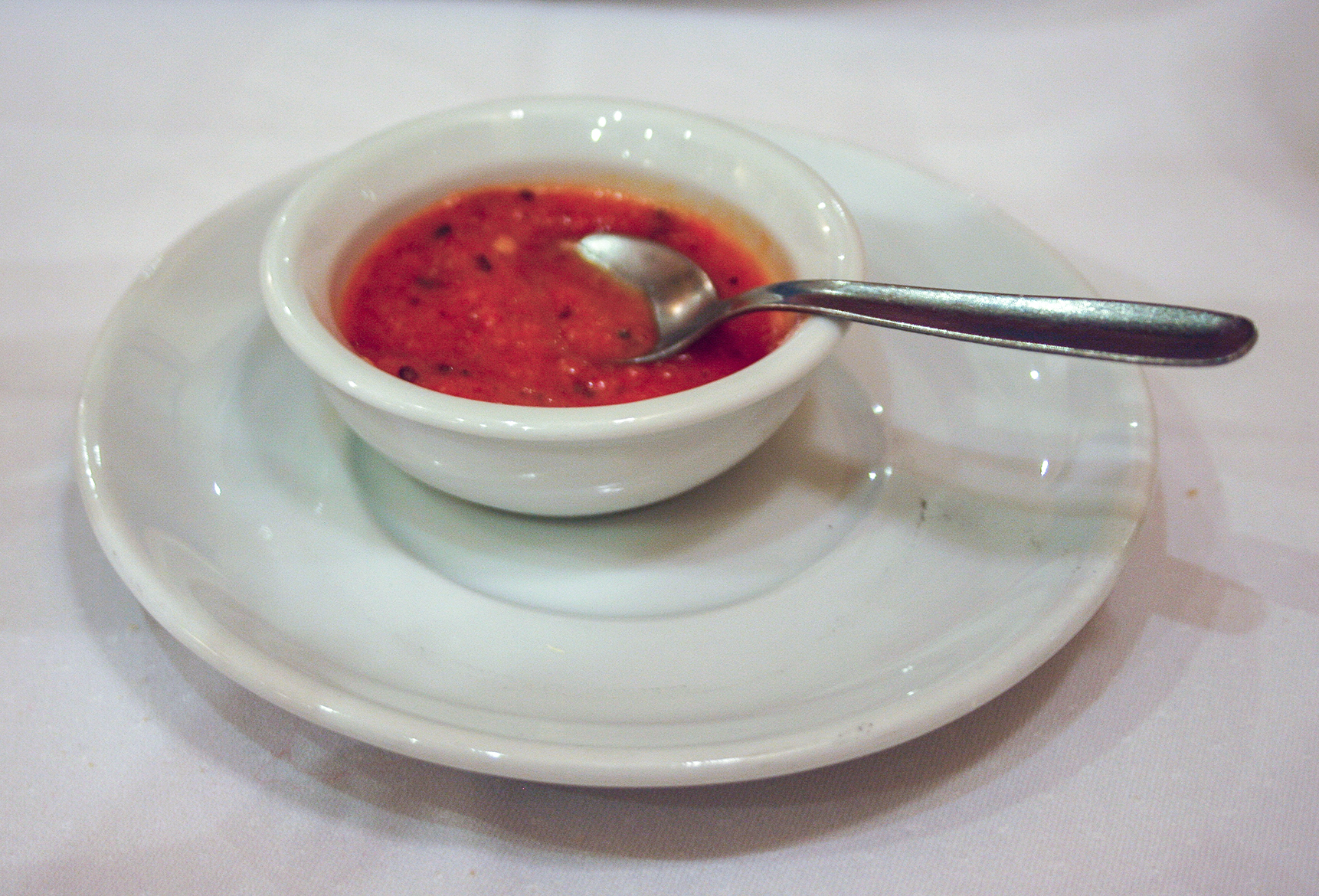 Salsa de rocotó